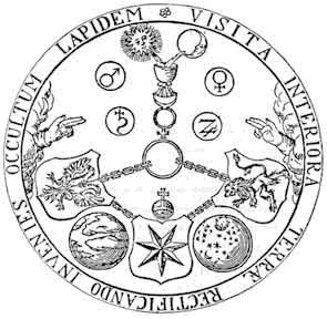 (Solomon Trismosinus, Aurum vellus, Hamburg, 1708) - Nel bordo, la frase latina di vitriolum. Il sole e la luna sono gli opposti che nell’uomo devono essere uniti. Il calice è il “vaso” o vasca alchemica, simbolo del corpo. I segni planetari rappresentano i diversi stadi del processo alchemico. La doppia aquila è il Mercurio, il leone è lo Zolfo e la stella è il Sale, i tre ingredienti del processo. Il globo sinistro con le nuvole è il microcosmo, il globo destro con le stelle è il macrocosmo. (Text taken from